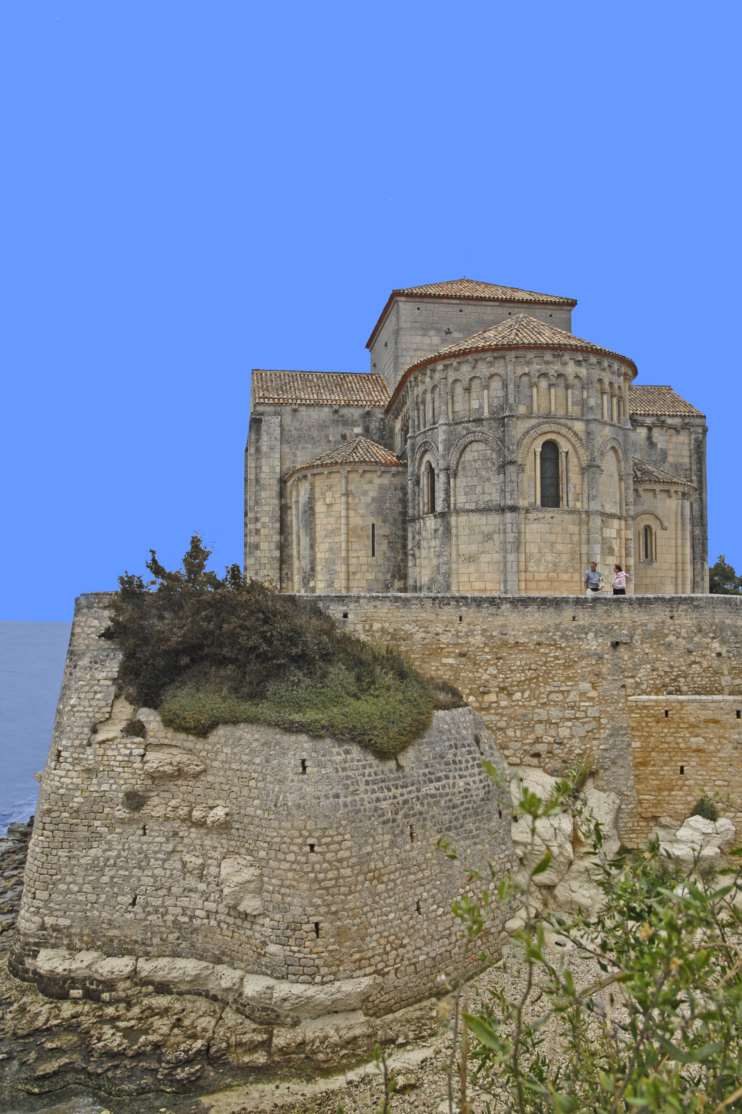 Sainte-Radegonde-Talmont-sur-Gironde,Chorhaupt von Osten